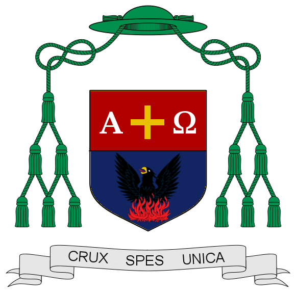 Escudo Diócesis de Rancagua